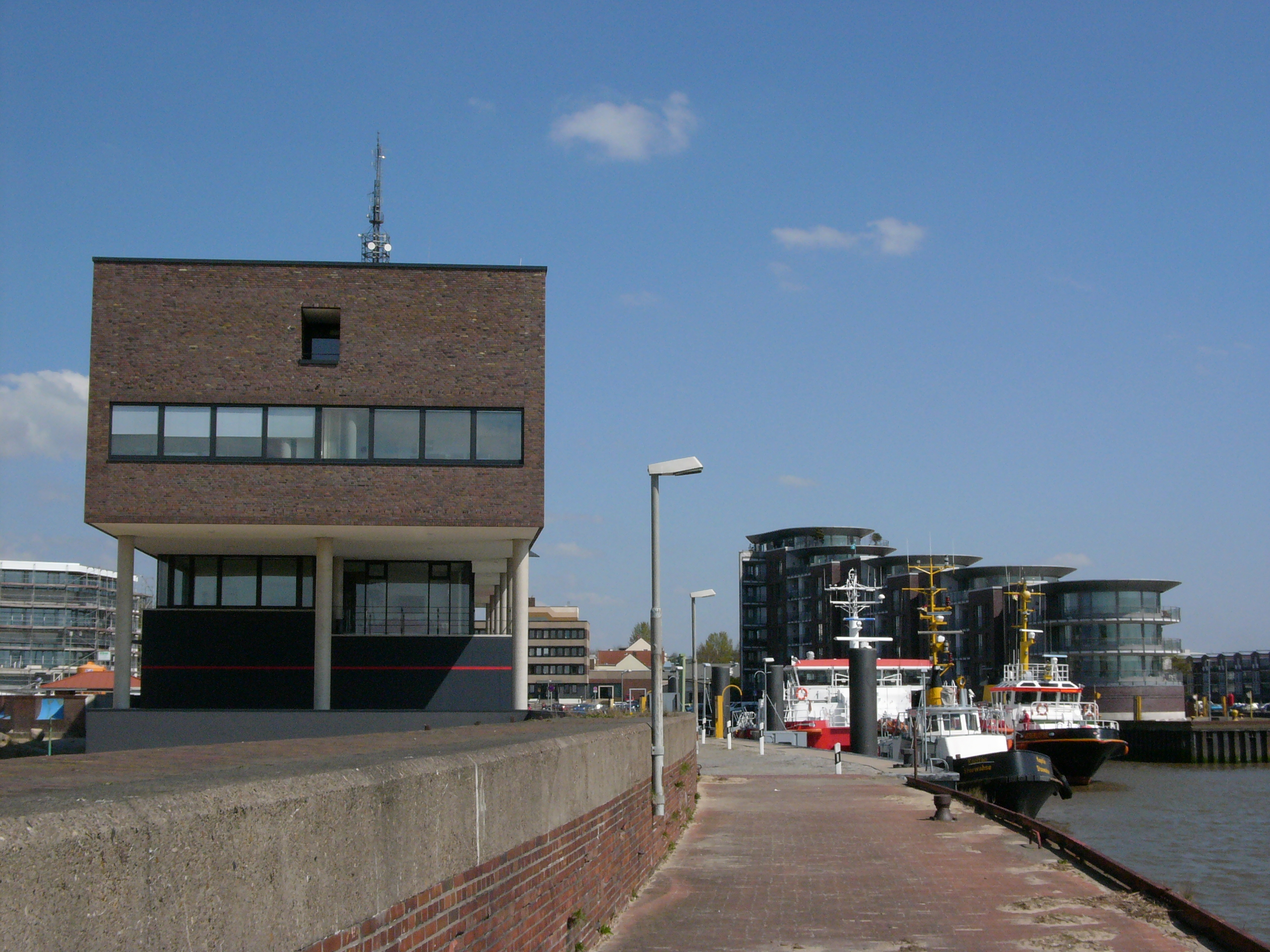 Lotsenschiffe und Lotsenhaus der Lotsenbrüderschaften Weser I und der Lotsenbrüderschaft Weser II/Jade im Vorhafen von Bremerhaven